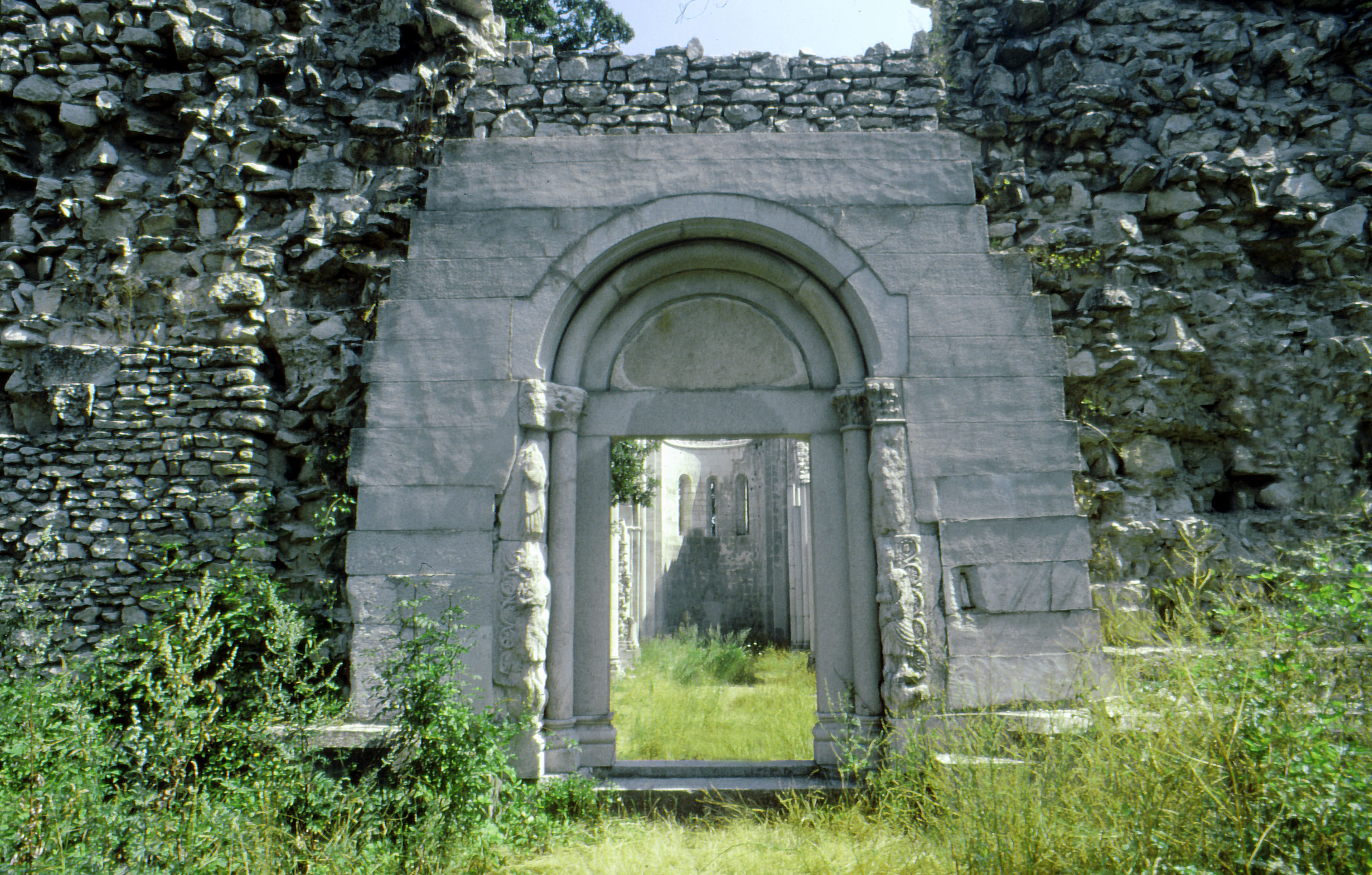 Vértesszentkereszt: templombejárat romja